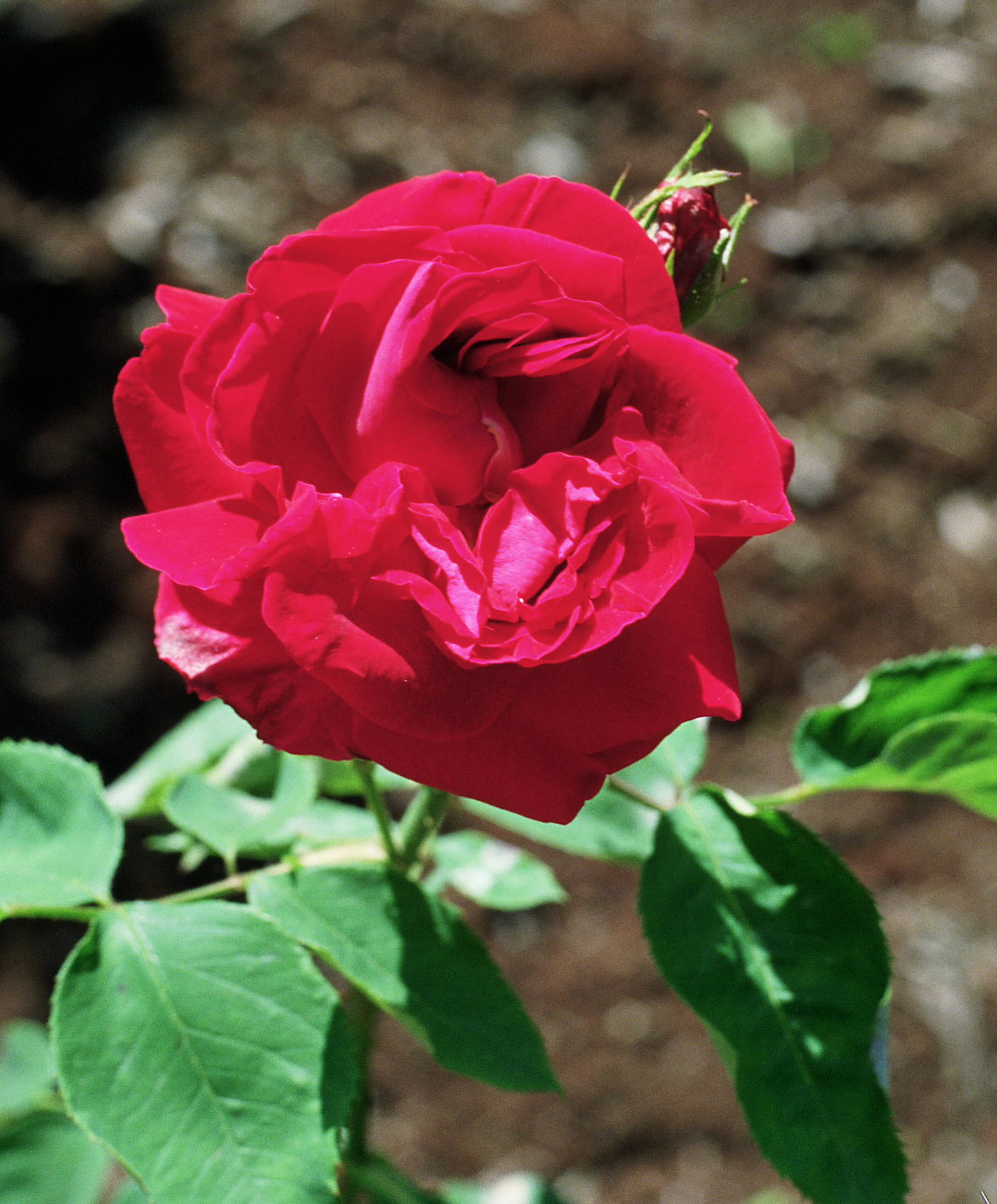 Rosa 'Général Jacqueminot', Híbridos reflorecientes, sect. Rosa. Real Jardín Botánico, Madrid